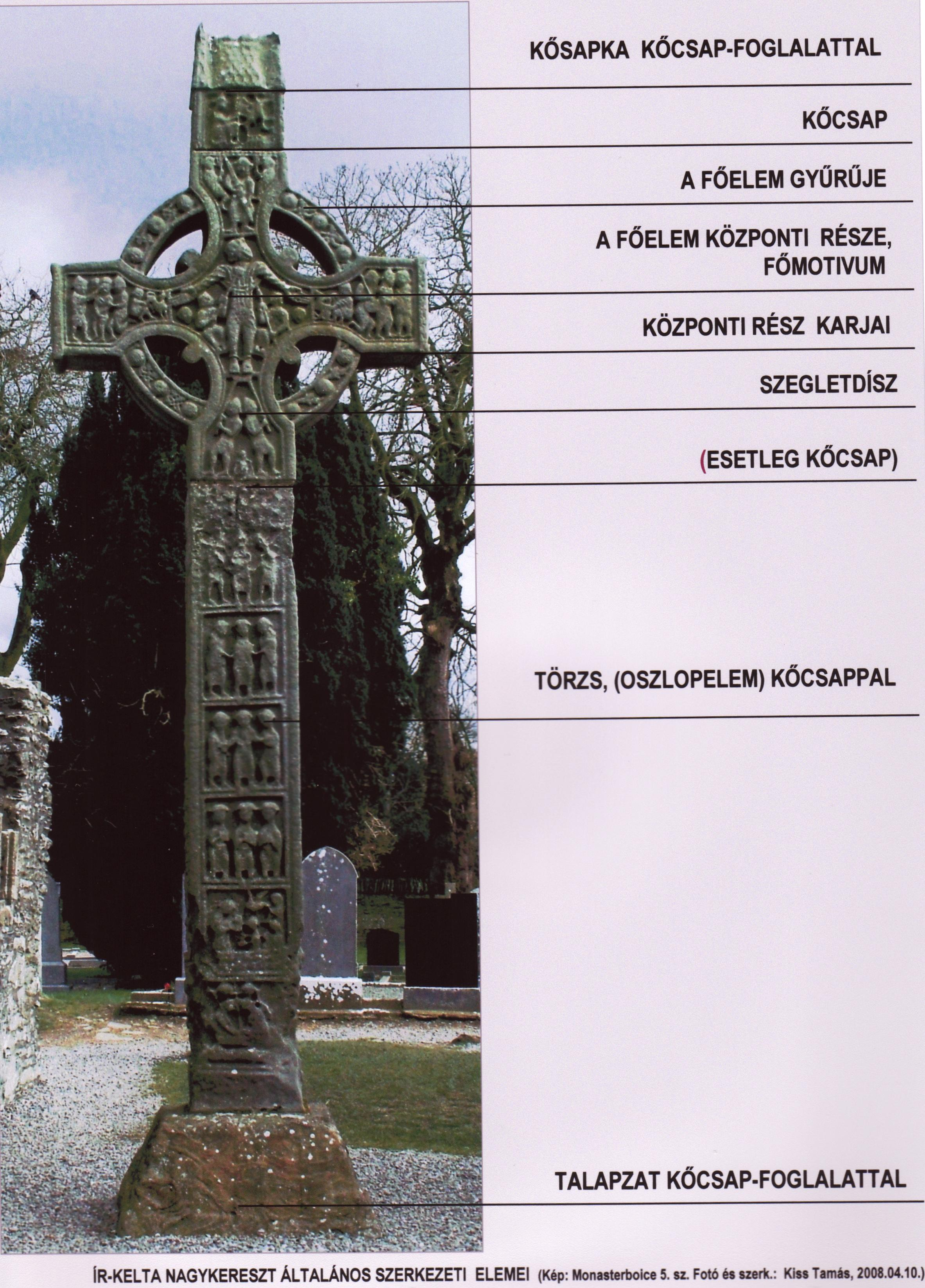 A kelta nagykereszt szerkezeti elemei (Monasterboice, Írország)